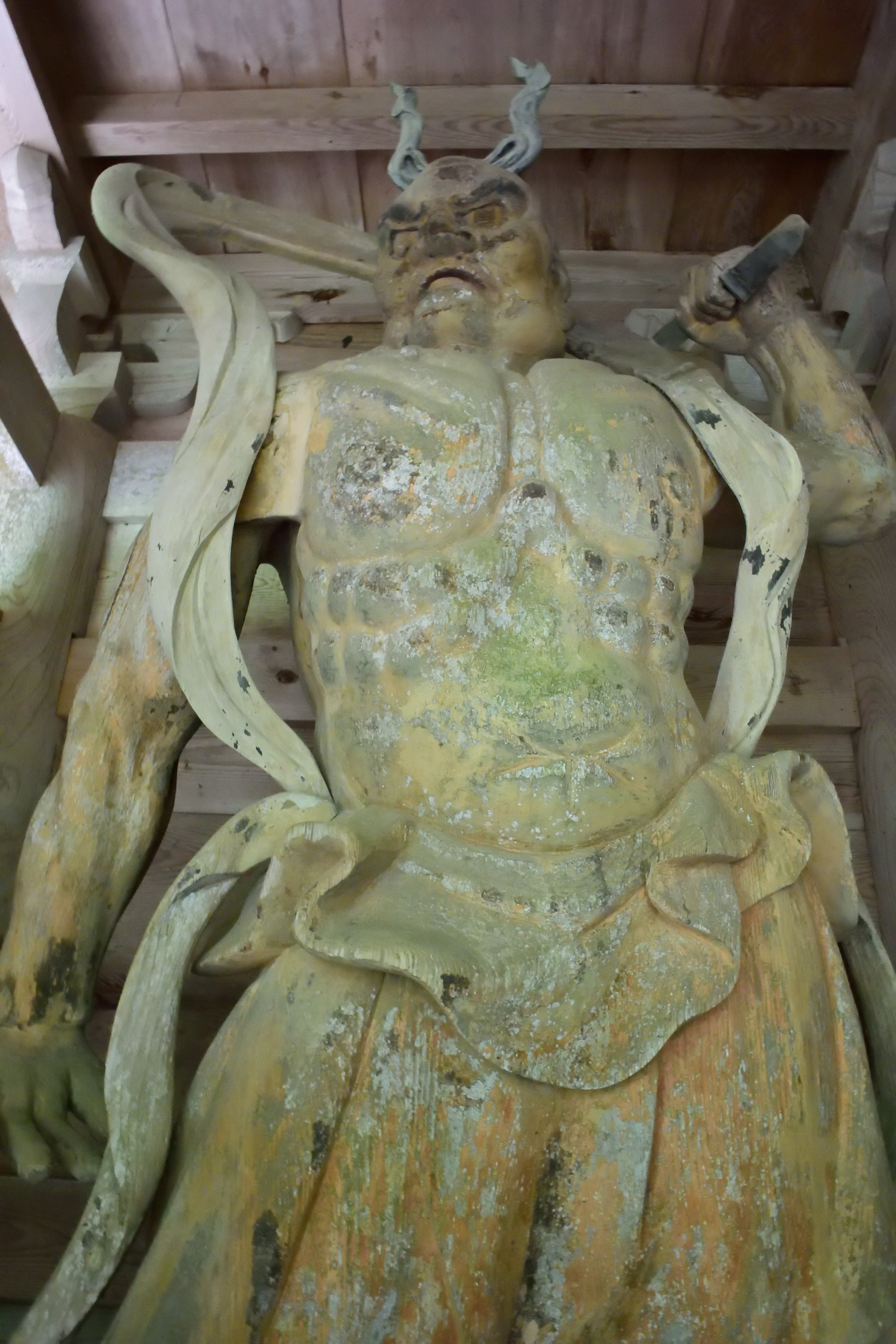 法住寺阿形像